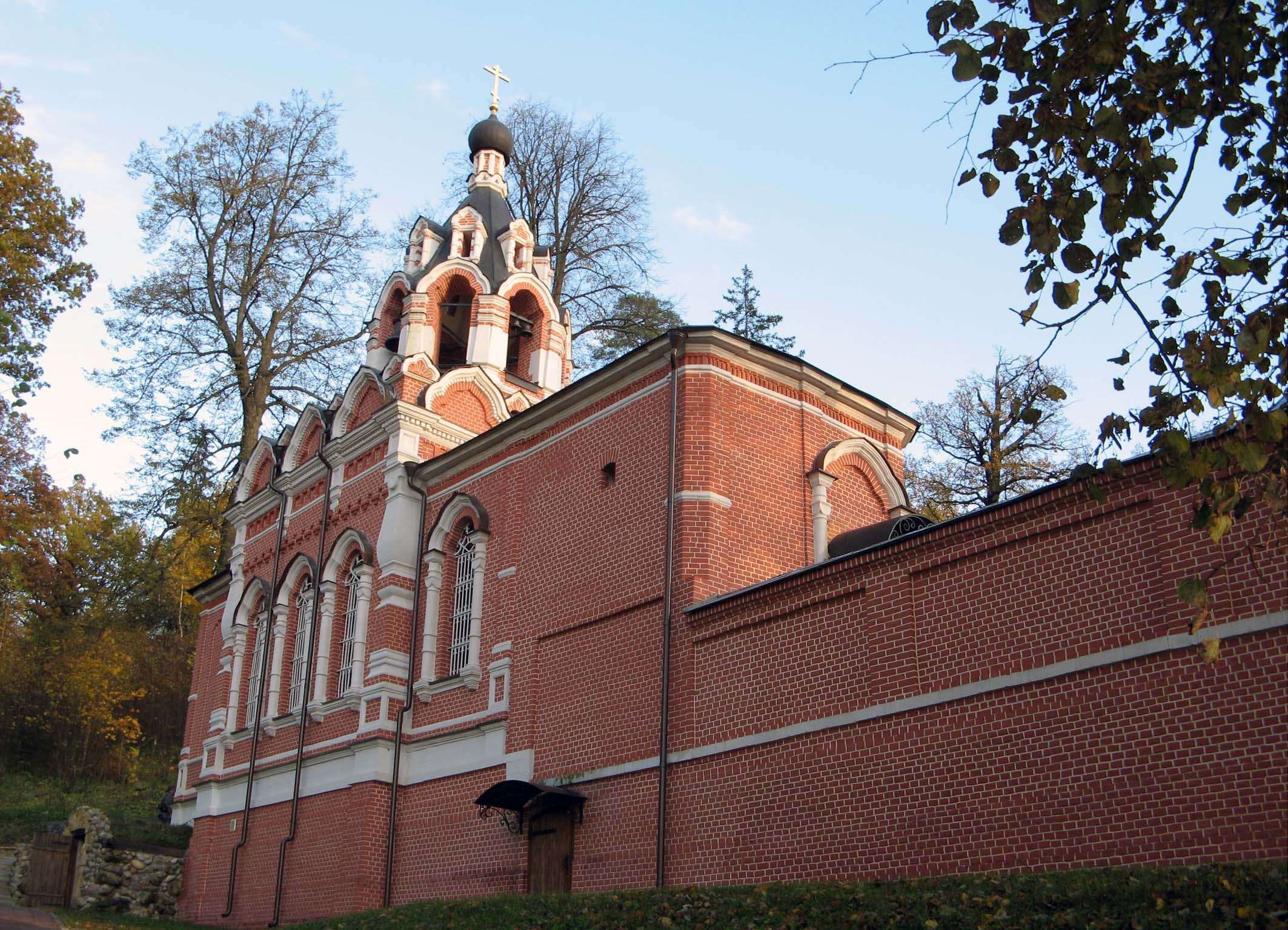 Звенигород, скит преподобного Саввы